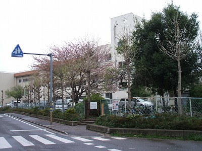 柏市立柏第七小学校校舎（北側）